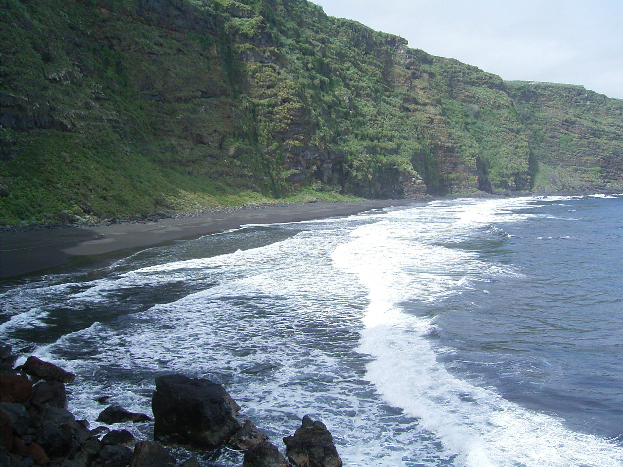 Playa de Nogales in Puntallana, La Palma, Canary Islands